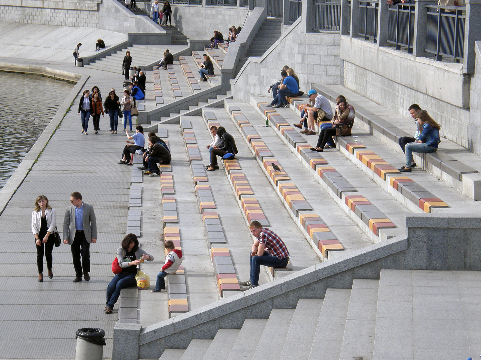 трибуны на набережной Рошен